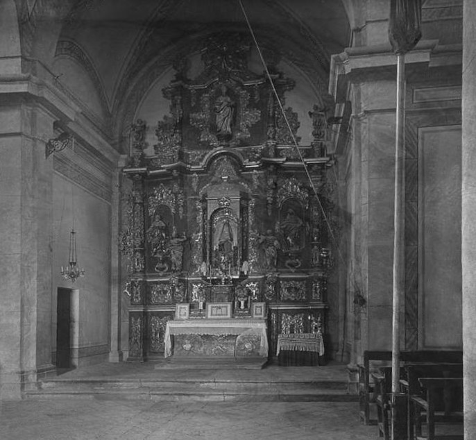 Antic Altar de la Capella de la Mare de Déu de Loreto. Josep Salvany i Blanch (1920)